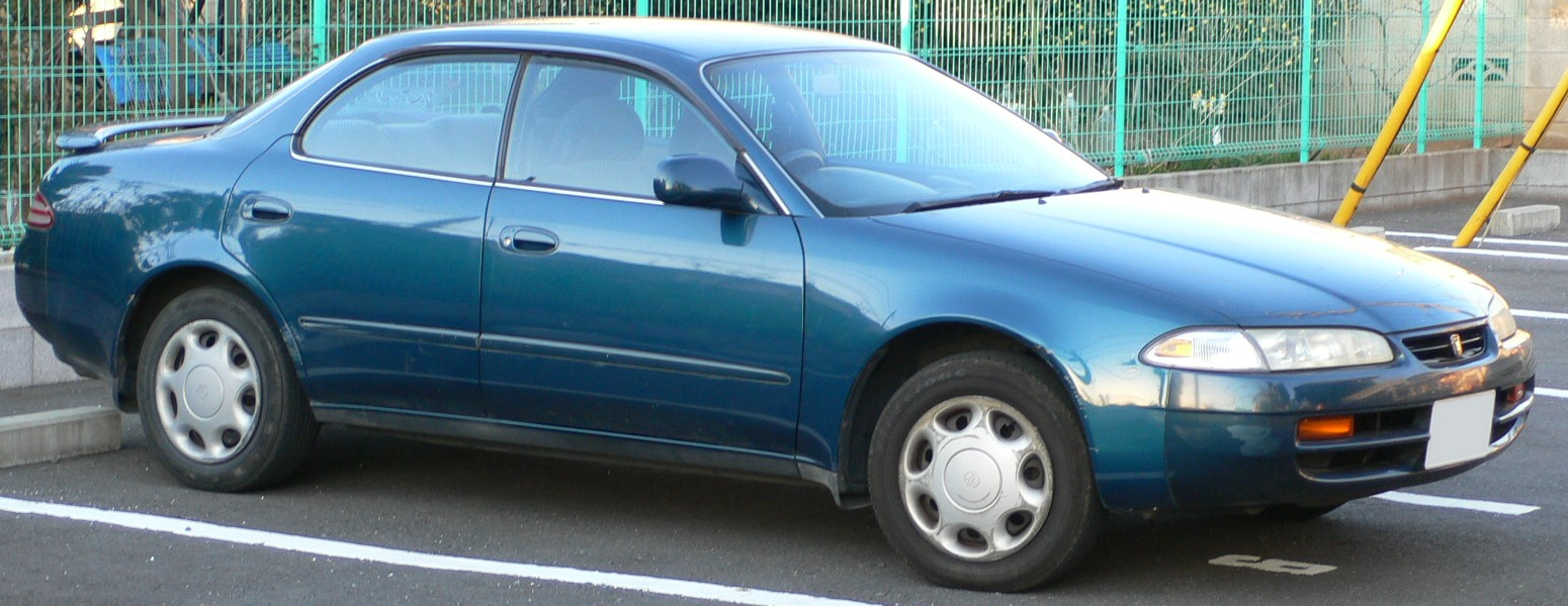 Toyota_Sprinter-Marino(1992)